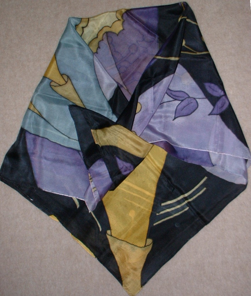 Seidentuch